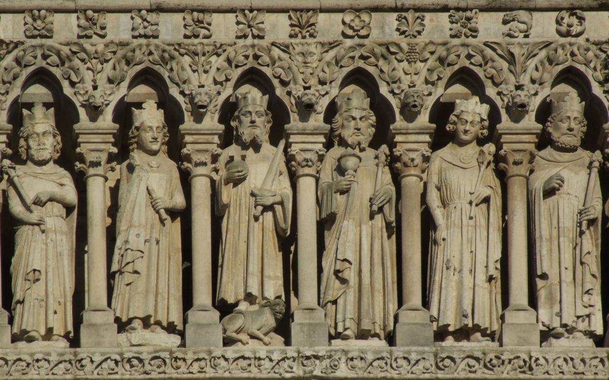 Amiens Cathedral (Cathédrale Notre-Dame d'Amiens), France